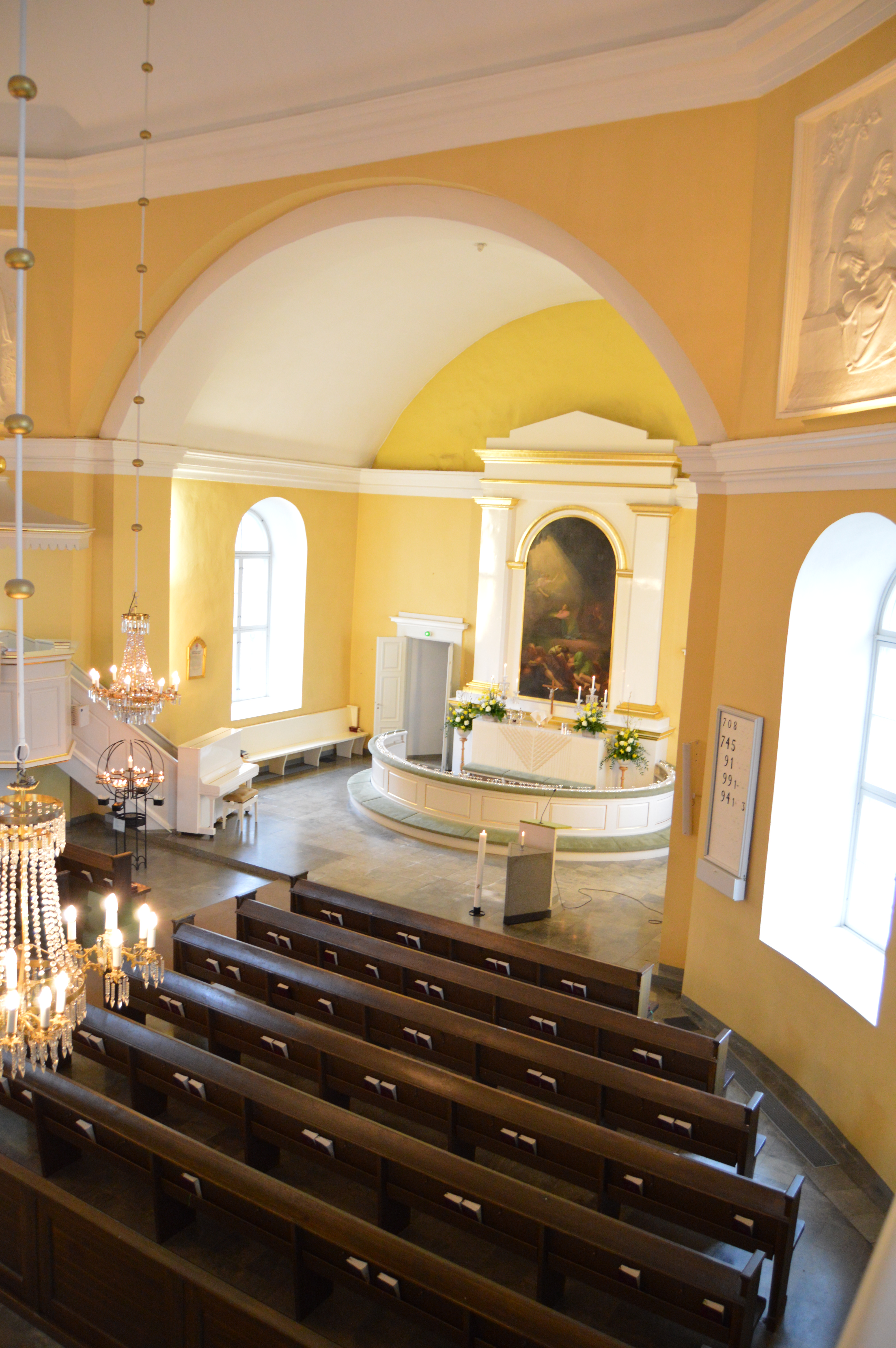 Kymin kirkon alttari